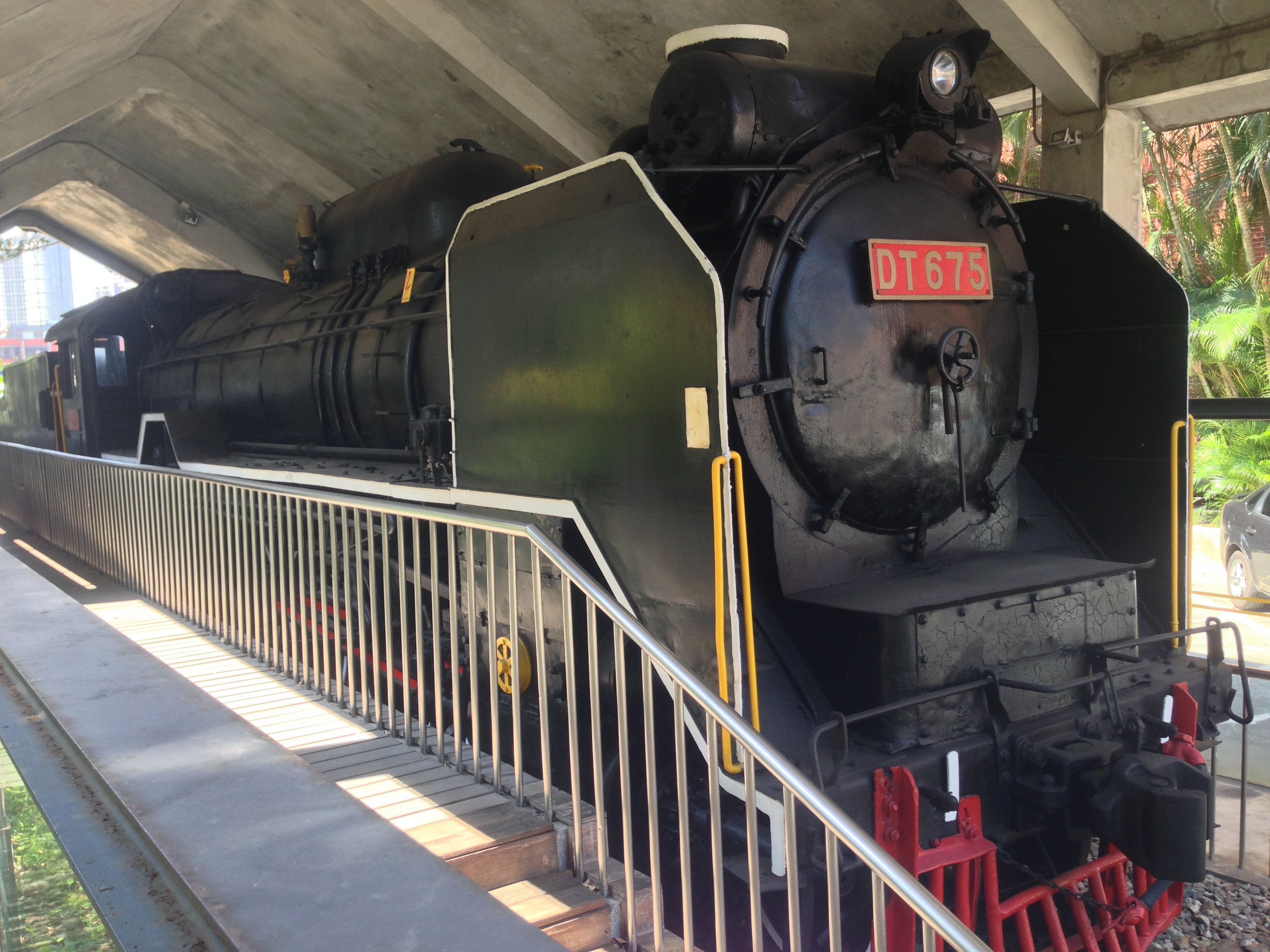 D51型煤水蒸氣火車頭DT675